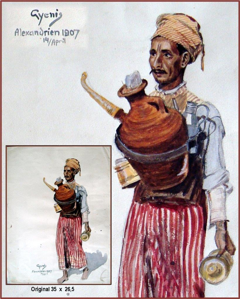 Aquarell von Hans Gyenis, "Der alexandrisché Wasserträger" gemalt in Alexandria/Ägyten, am 14.April 1907